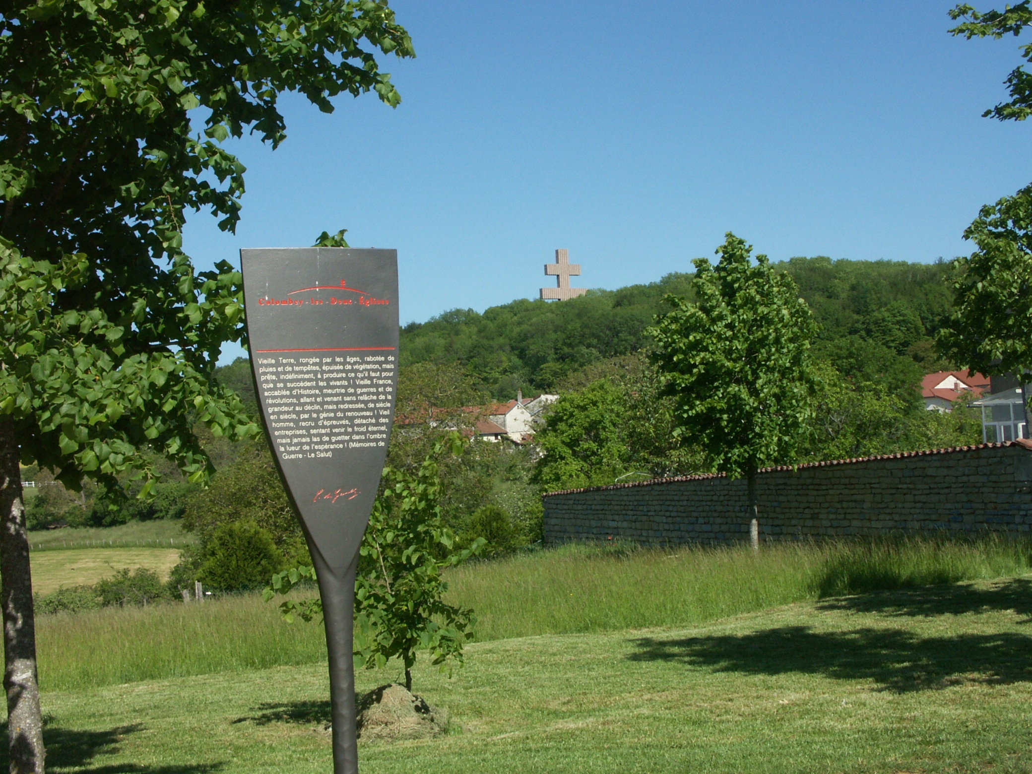 Colombey-les-Deux-Églises - Vue panoramique